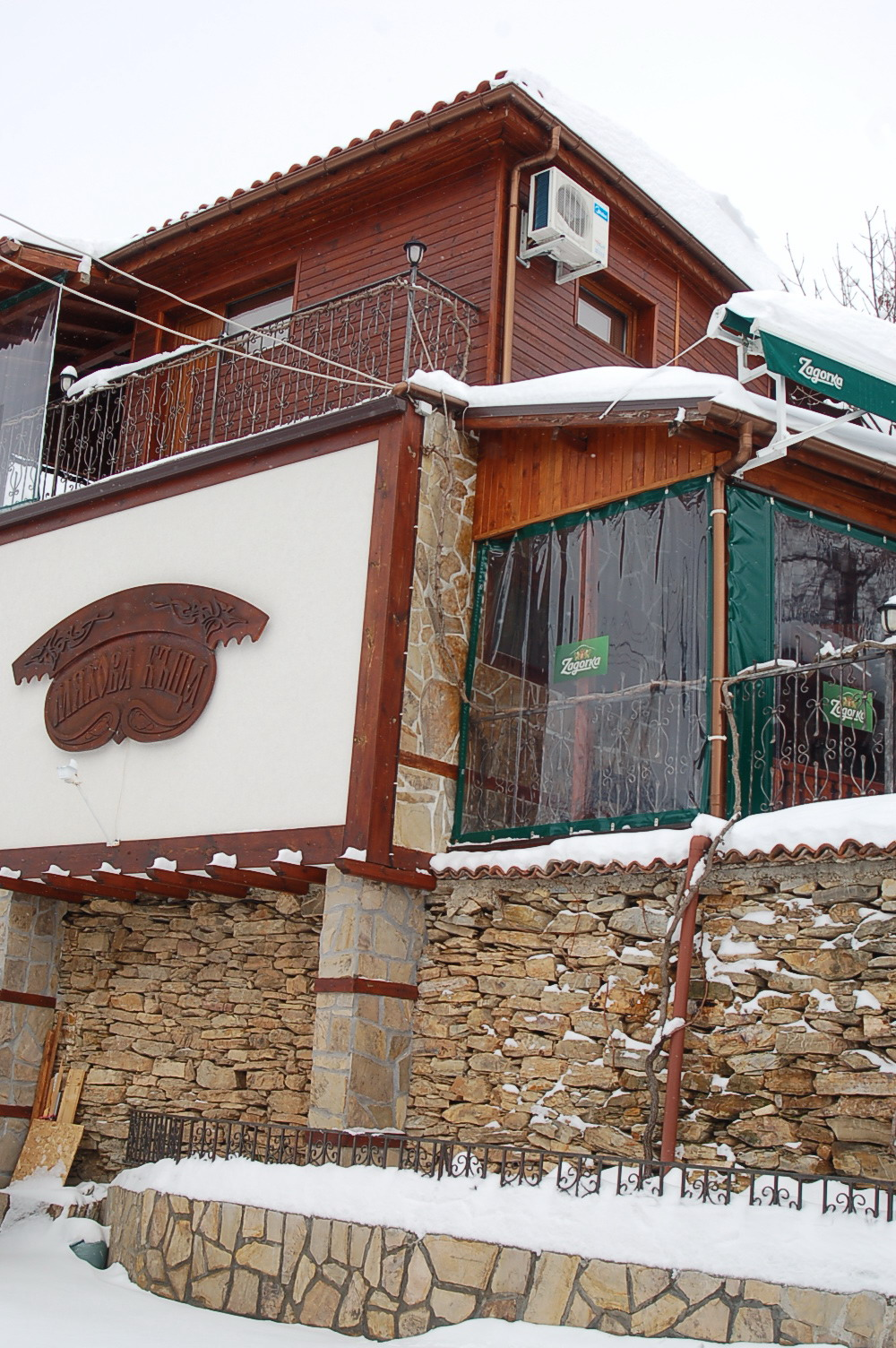 Мяхова къща в Дъбрава